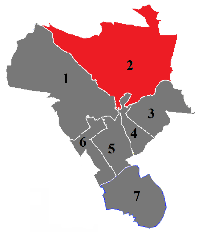 Situation du canton dans la ville de Nîmes